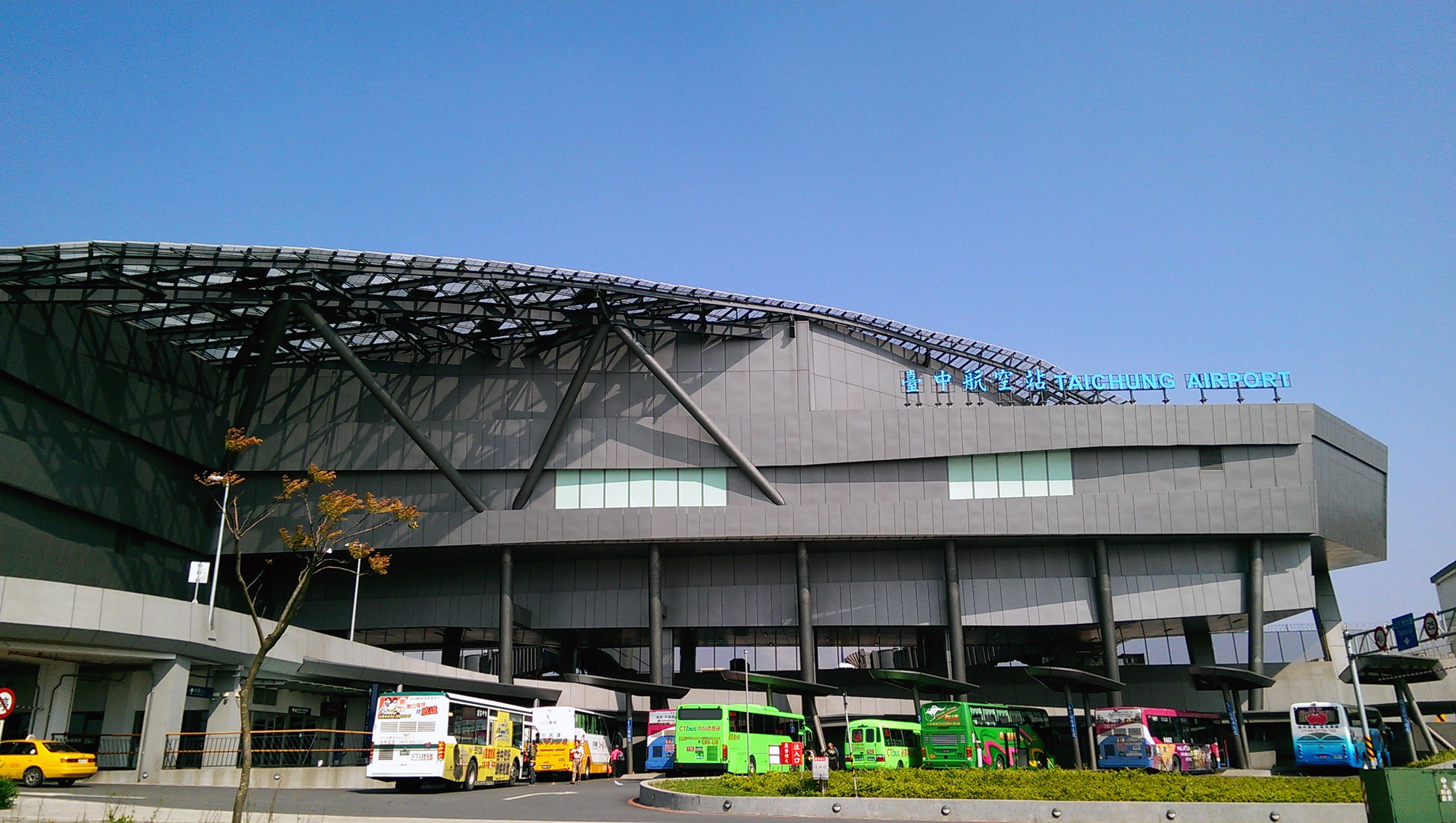 臺中航空站國際航廈